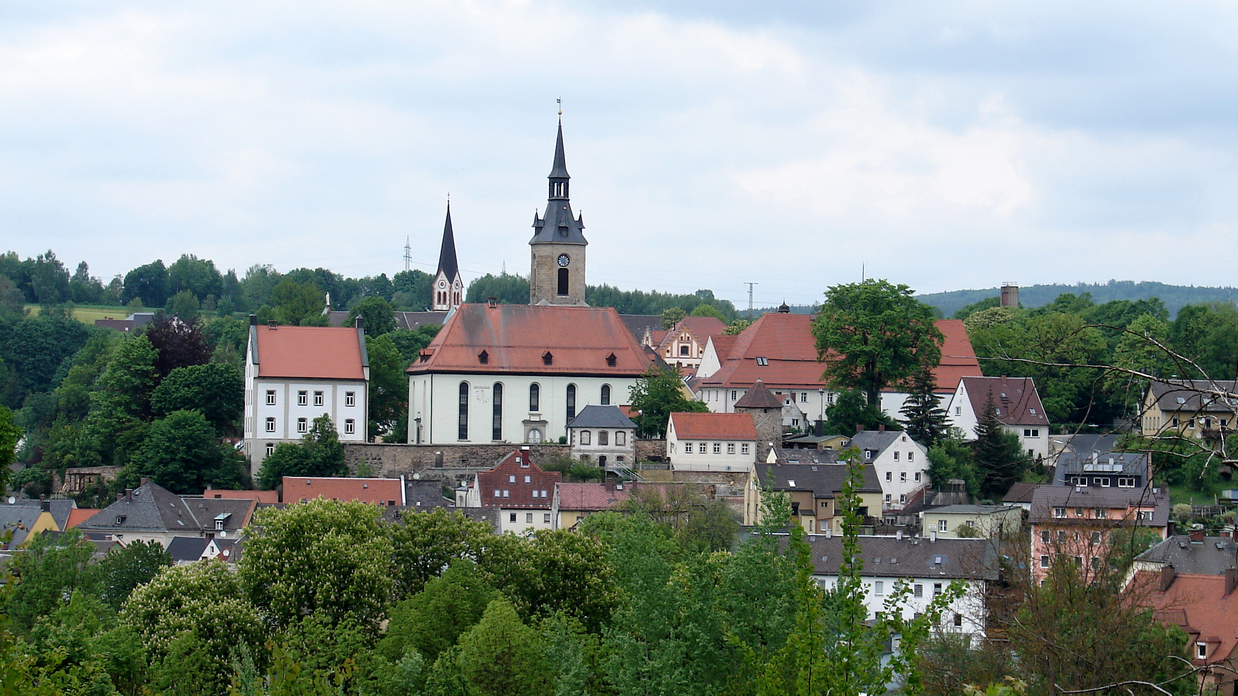 Seit 1790 nach Plänen von Johann Gottlieb Riedel nahezu vollständig neu errichtet, 1883 Turmhelm verändert; mit Ausstattung.